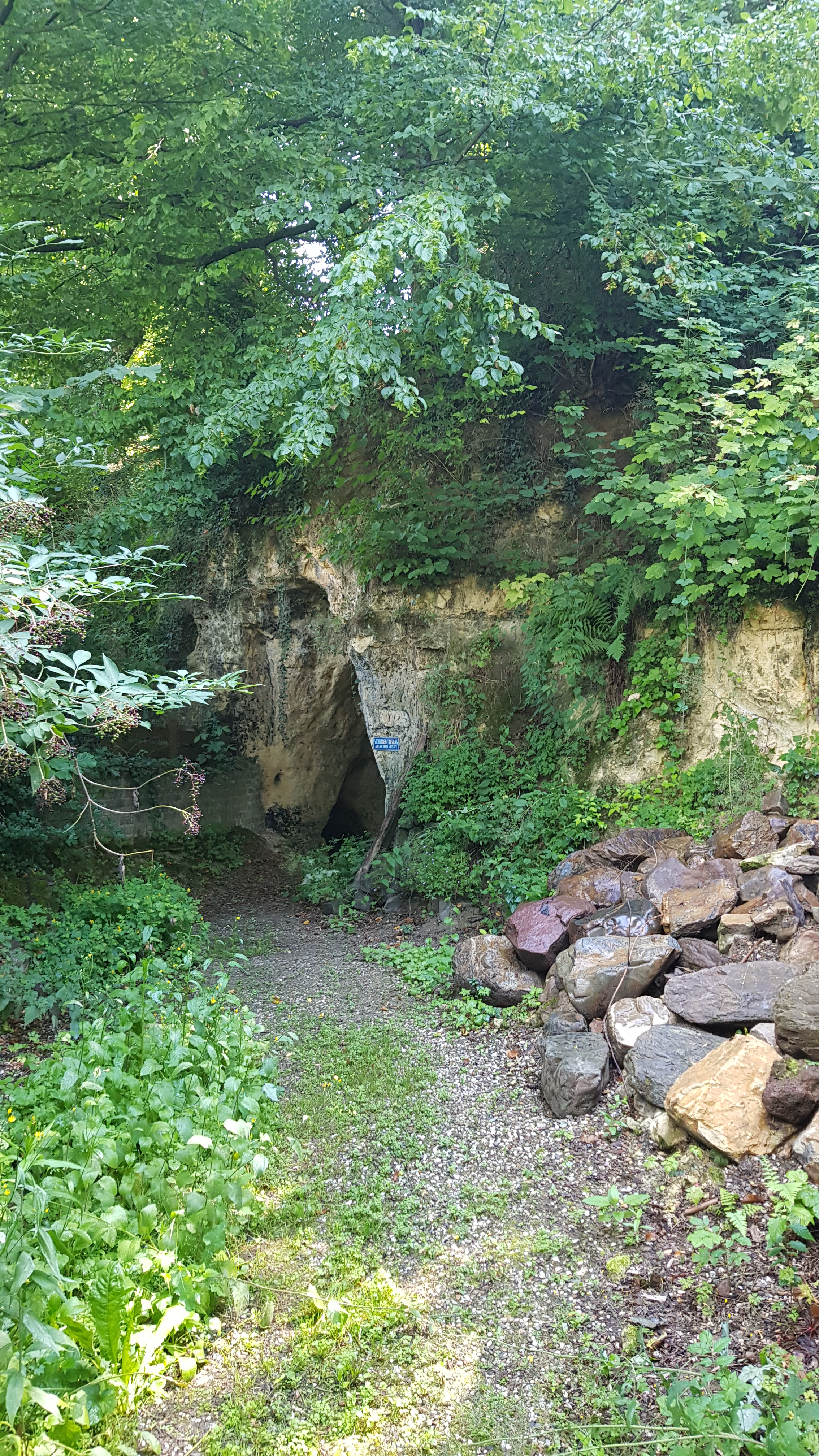 Bemelerbosgroeve I, Bemelen, Nederland